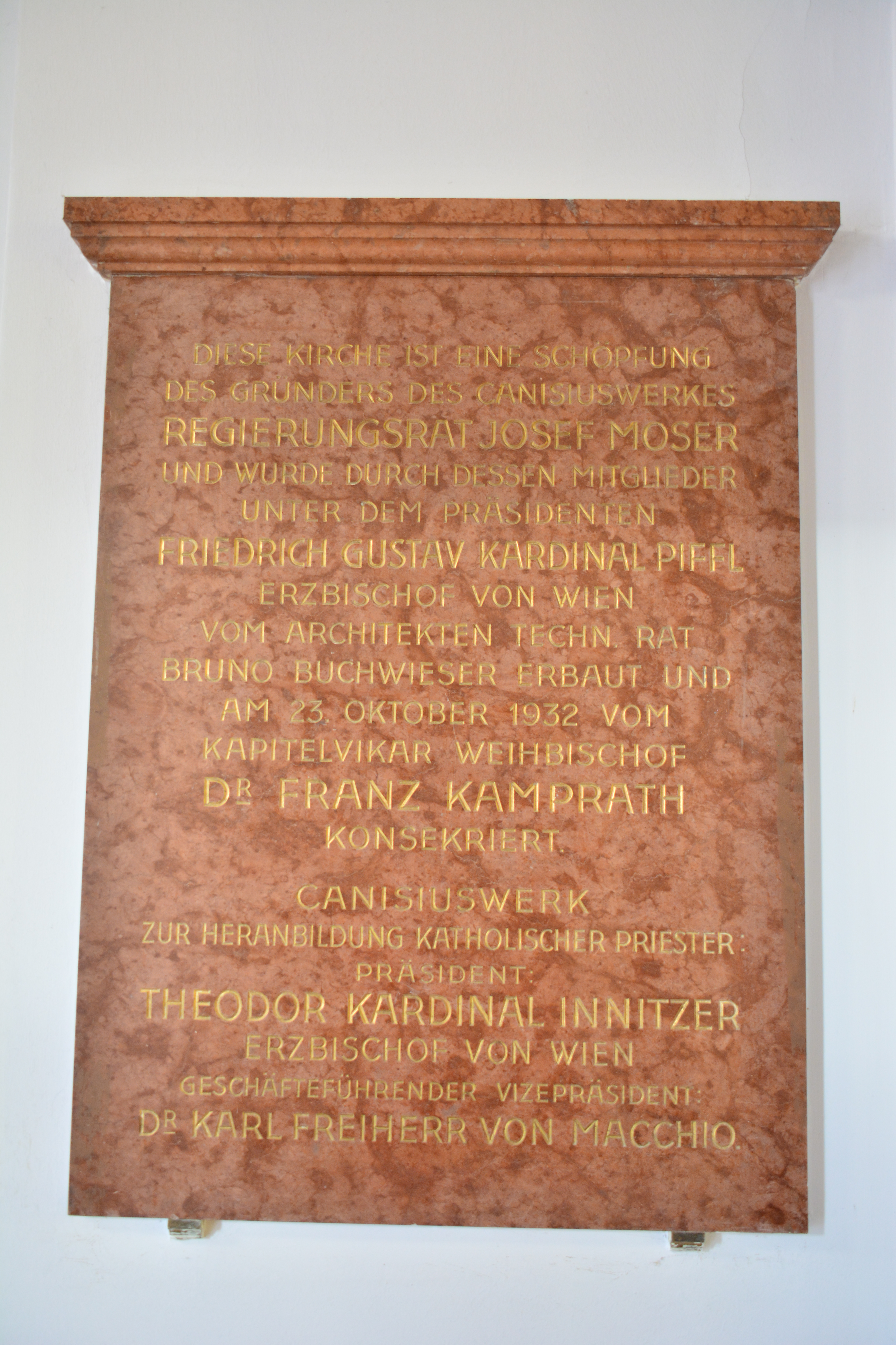 Gedenktafel für den Bau der Herz-Jesu-Sühne-Kirche (Wien, Dr.-Josef-Resch-Platz 12)